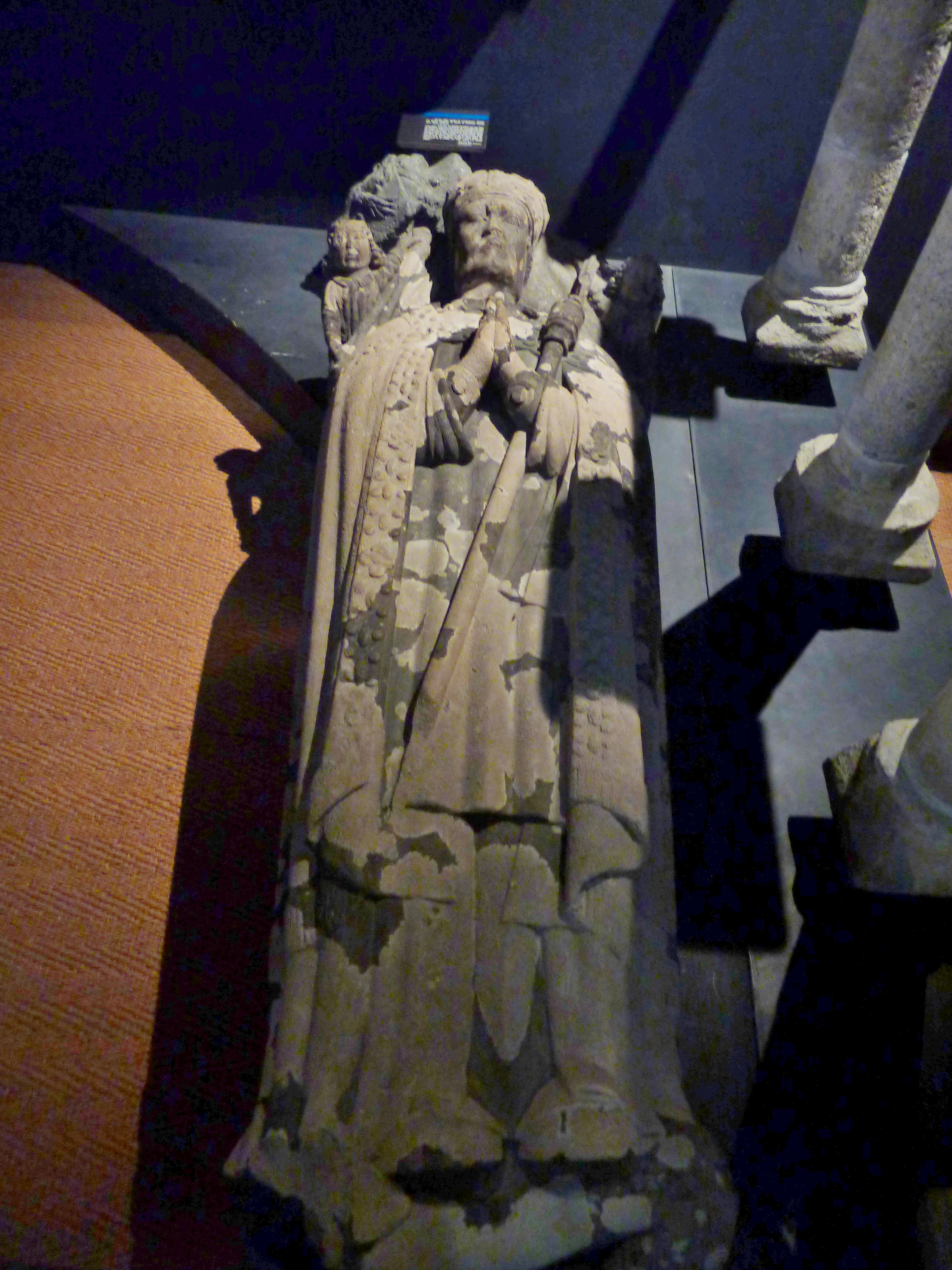 L'enfeu de Jehan du Vieux-Chastel, dernier abbé régulier de Landévennec, décédé en 1522. Cet abbé fit faire de grands travaux dans l'église abbatiale et fut enterré dans l'église abbatiale devant l'autel de Notre-Dame dans une sépulture de pierre que l'on mit près de la croisée en 1645 quand on haussa l'église (d'après Dom Noël Mars, Histoire du Royal Monastère de Landévennec, Musée de l'ancienne abbaye de Landévennec)